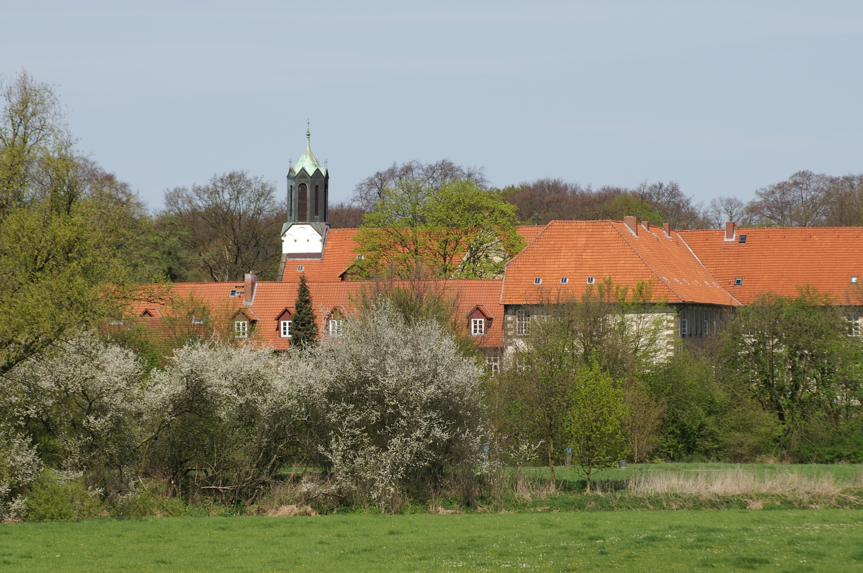 Hannover - OT Marienwerder - Kloster. 2005-04-20 Autor: Ingo Rickmann